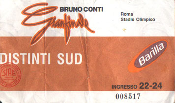 Il biglietto della partita di addio di Bruno Conti allo Stadio Olimpico maggio 1991